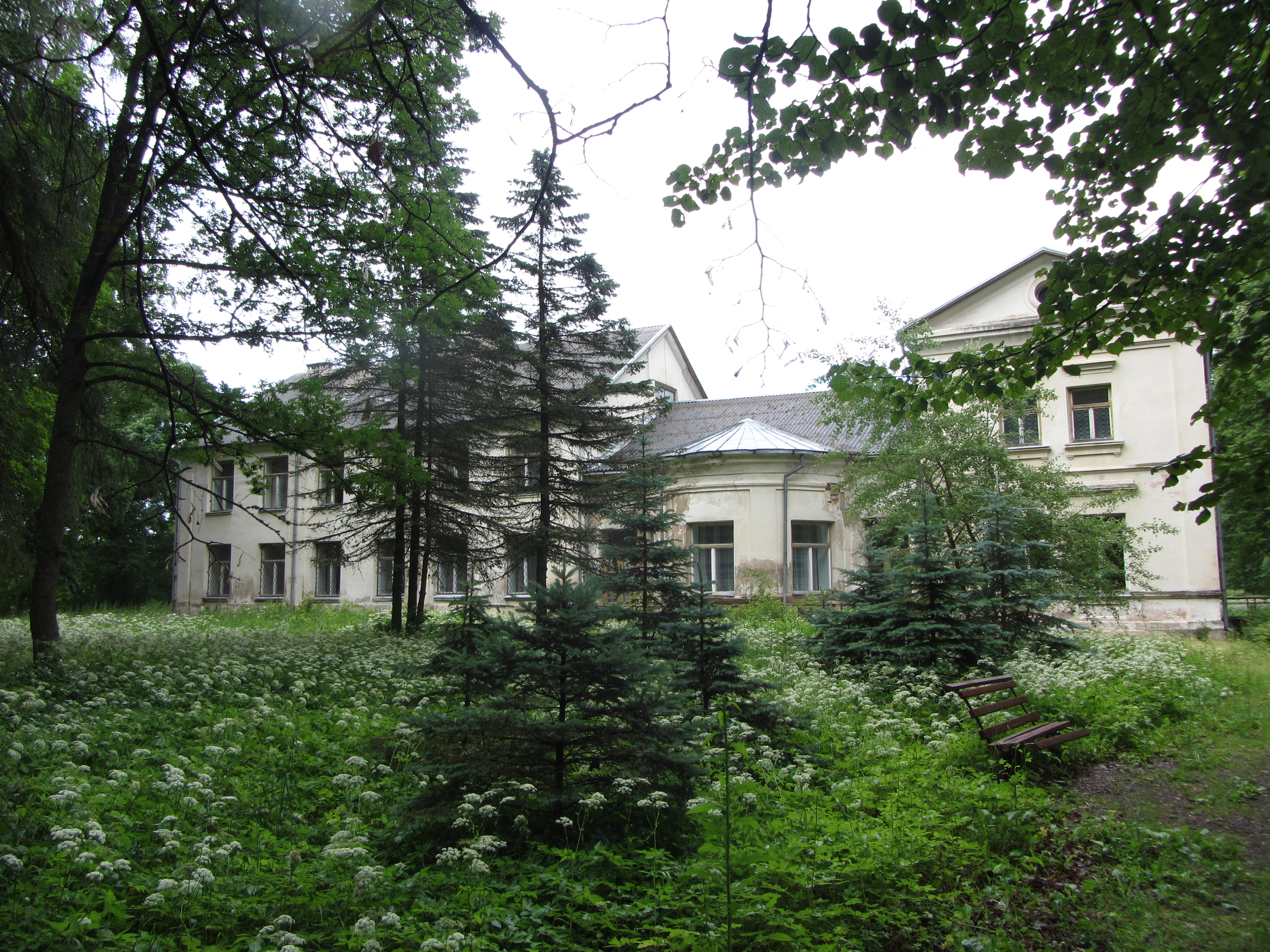 Paneriai 21367, Lithuania